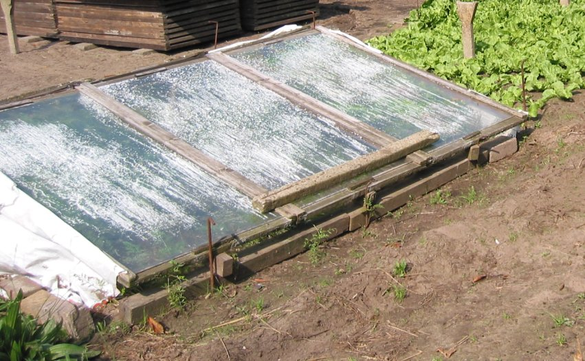 zelfgemaakte foto van stormvaste op lucht staande dubbele broeibak